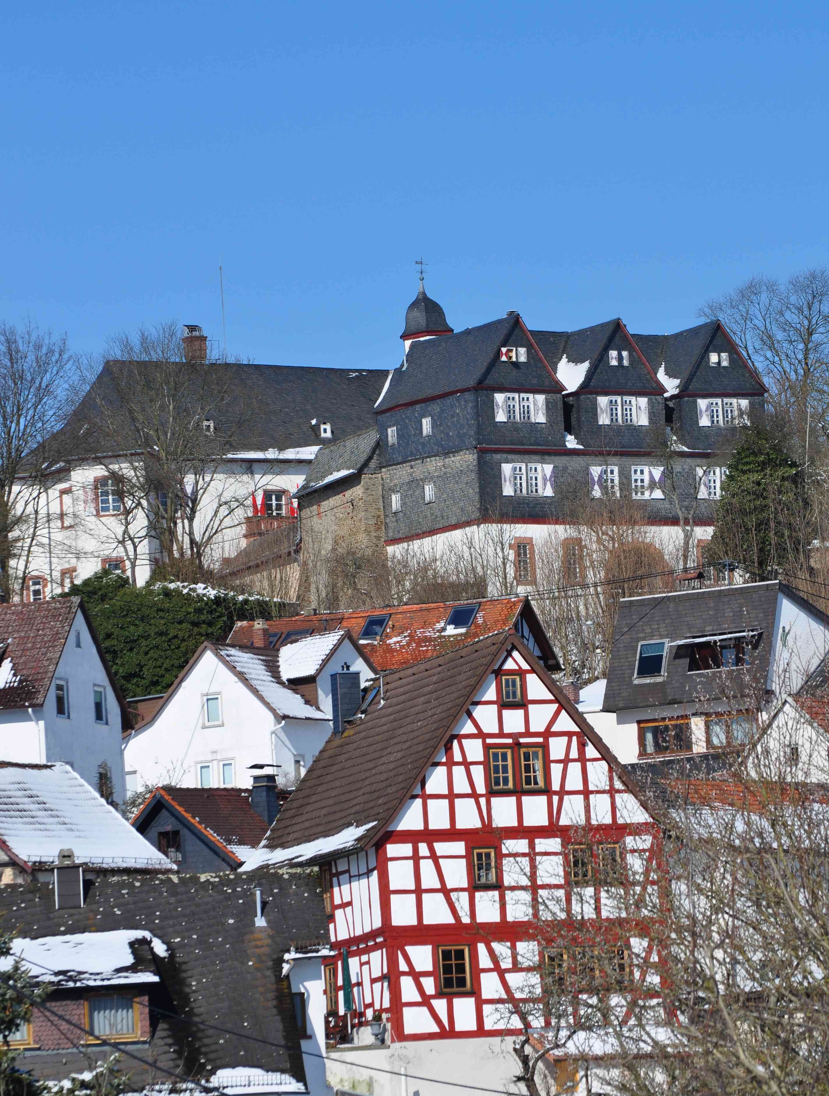 Ort und Schloss Neuweilnau. Hauptgebäude Schloss Neuweilnau, Weilrod, Hessen, Deutschland, u.a. Geburtsort von Philipp III. (Nassau-Weilburg) (1504-1559), dem Erbauer der Residenz Weilburg. Es wurde von einem seiner Söhne, Philipp IV. (Nassau-Weilburg) (1542-1602), von 1564-1566 als Residenz ausgebaut, bevor dieser 1571 seine Residenz von Neuweilnau nach Saarbrücken wegen eines Erbfalls verlegte.